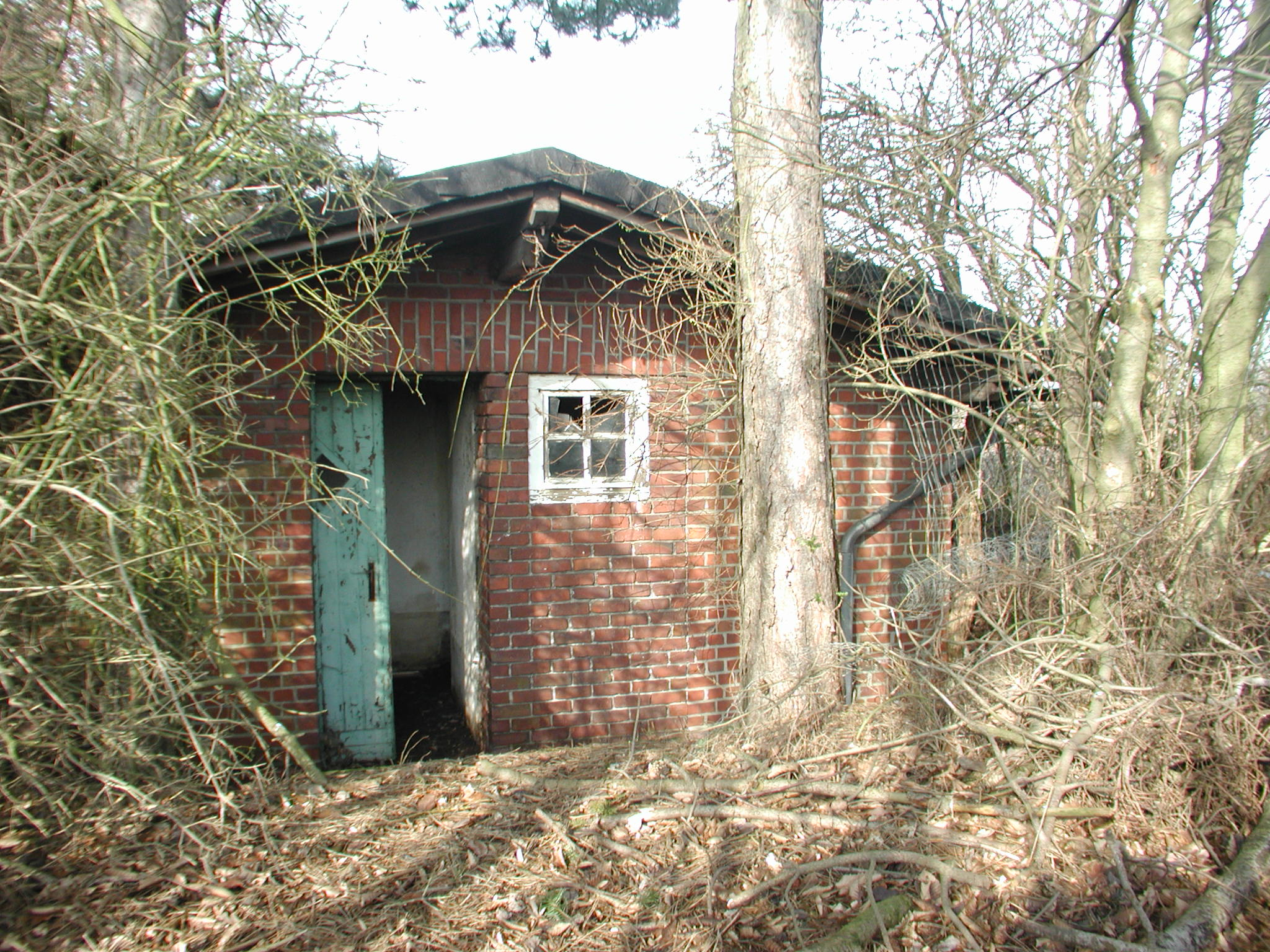 Rellingen, Moorkampsweg, Wohnunterkunft Flakstellung II. Weltkrieg